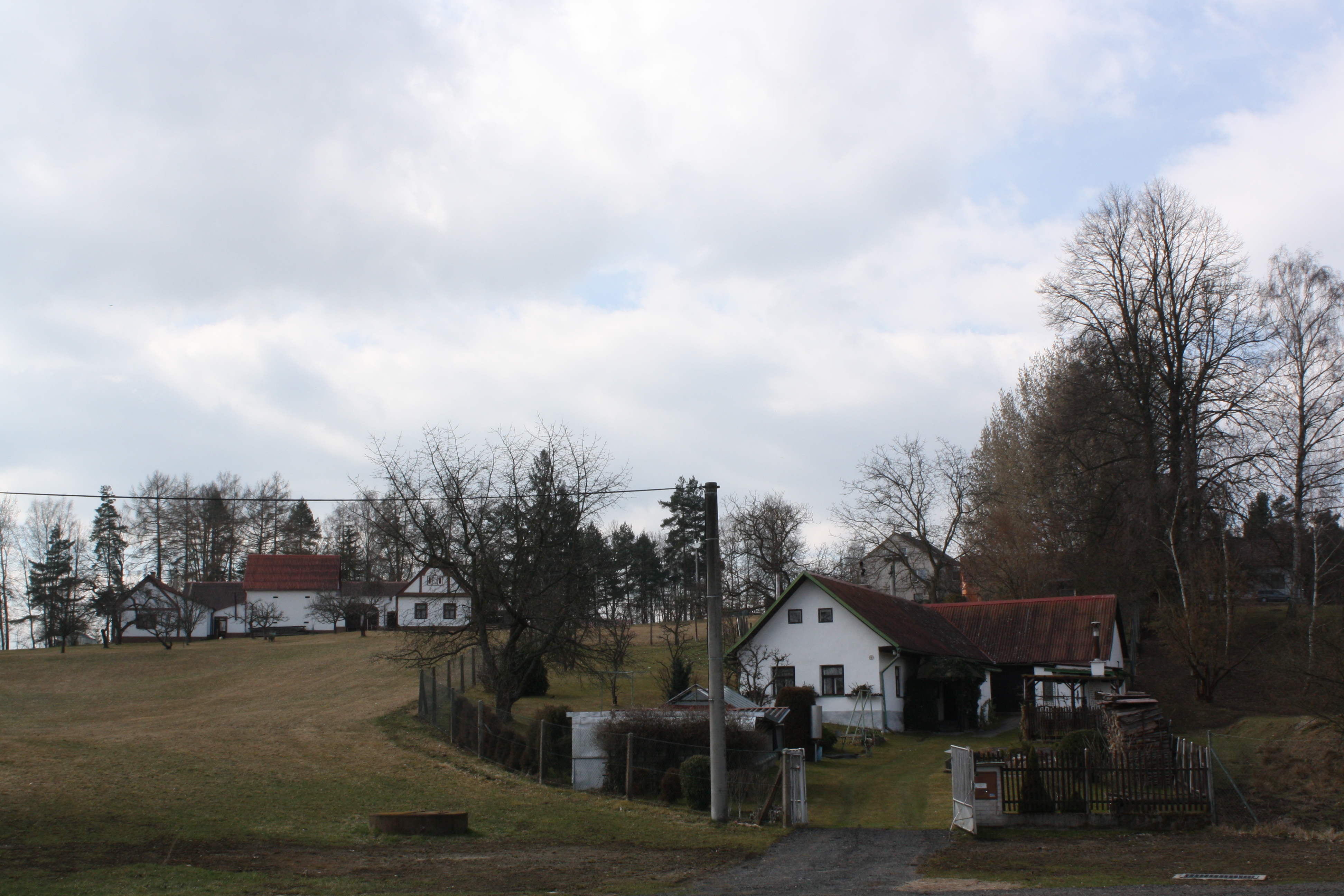 Štěpánovice (okres České Budějovice)